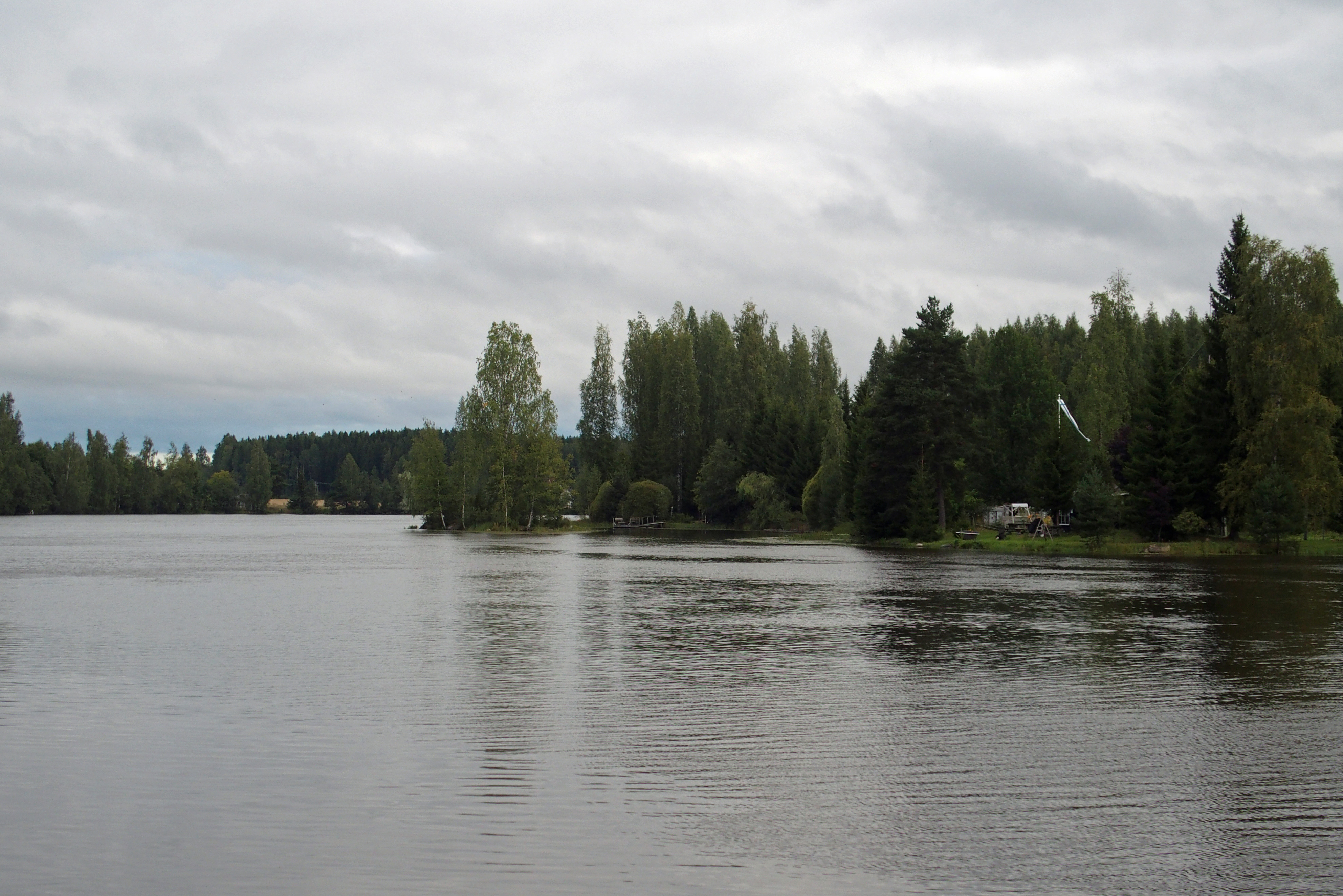 Säpilänniemen kärkeä lännestä päin